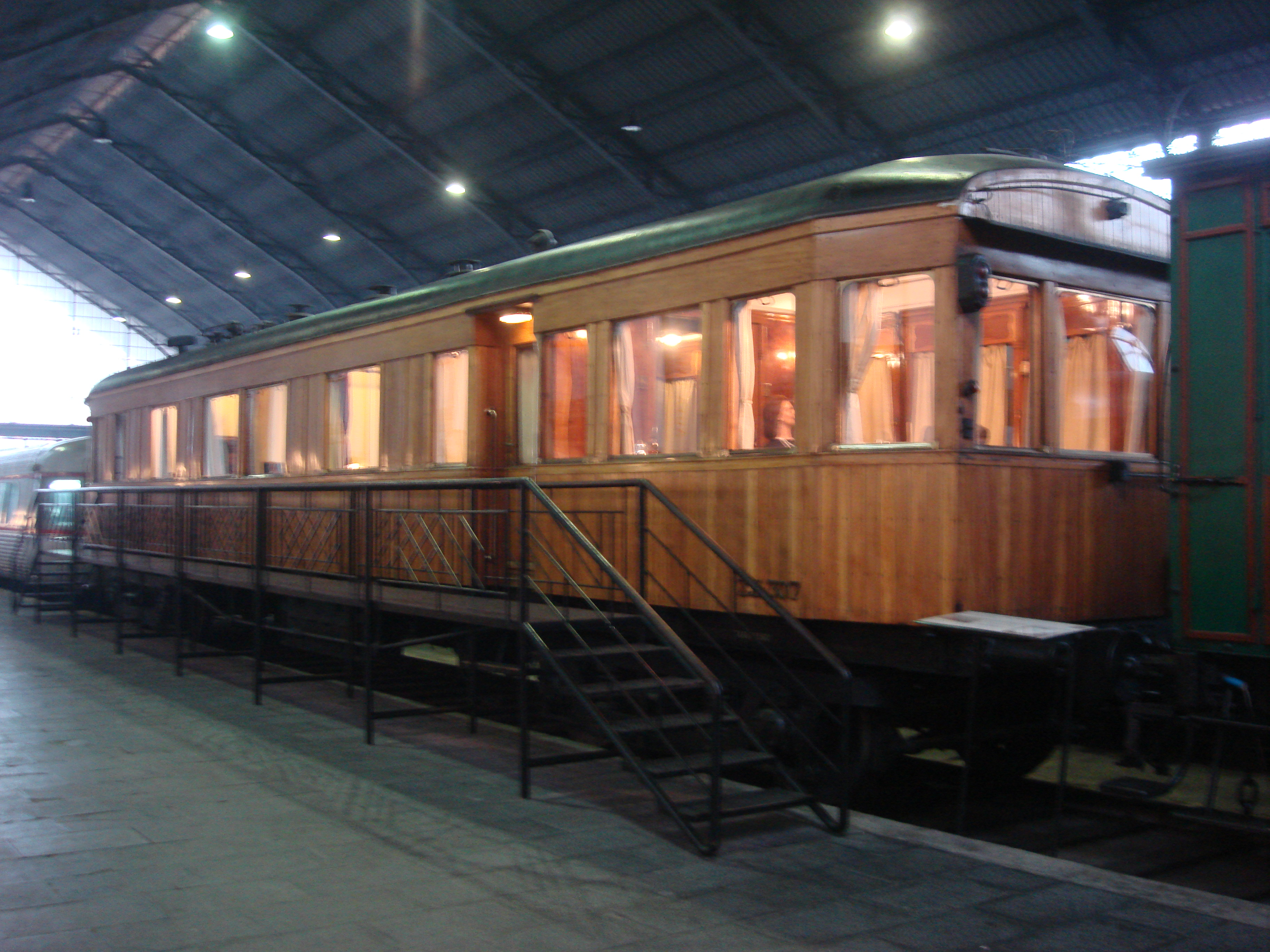 Own work